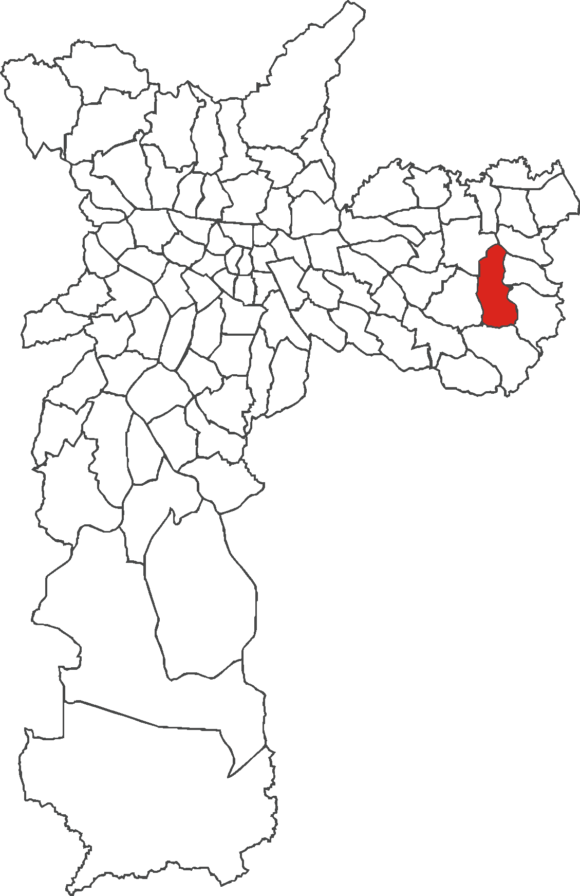 Localização do distrito de José Bonifácio no município de São Paulo.